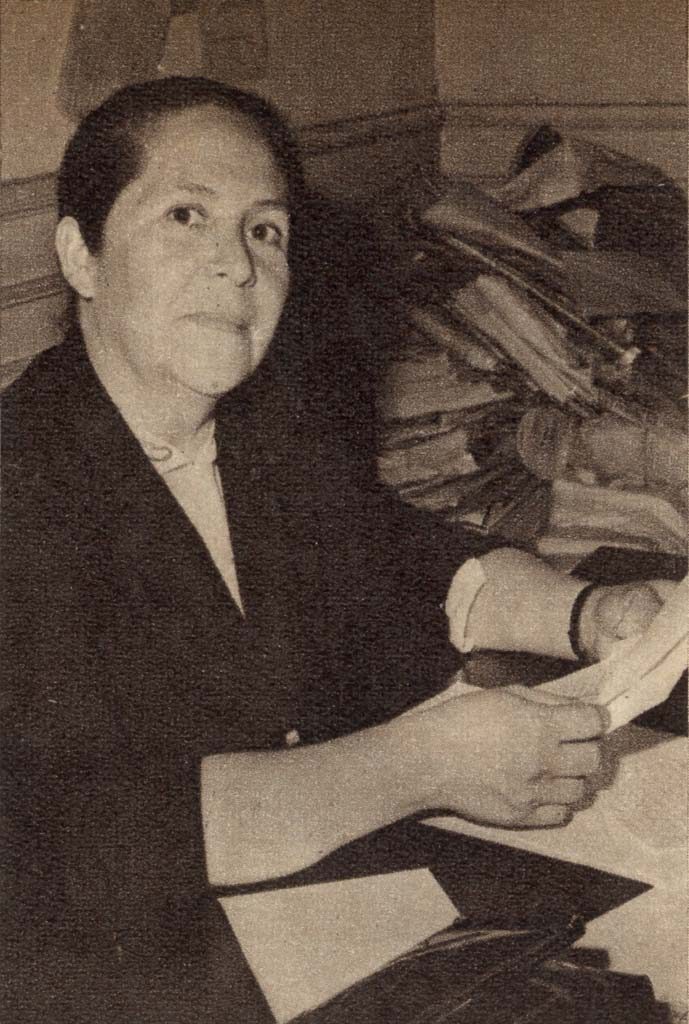 Julieta Campusano Chávez (Coquimbo, 31 de mayo de 1918-Santiago, 11 de junio de 1991) fue una política chilena.